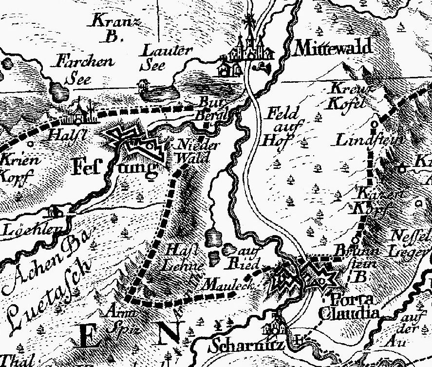 Atlas Tyrolensis, Peter Anich, Blasius Hueber, 1774, Maßstab 1:103.800, Detail: Porta Claudia